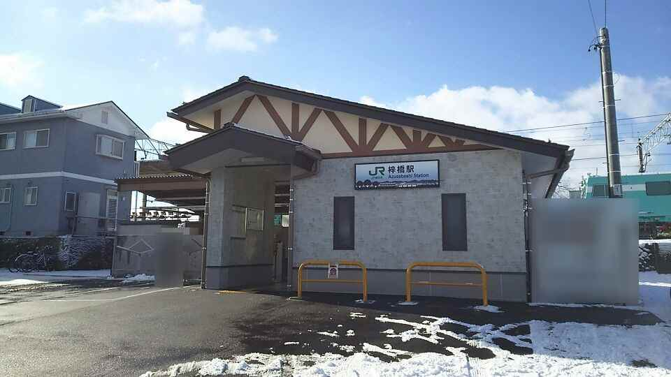 JR東日本大糸線梓橋駅の駅舎です。